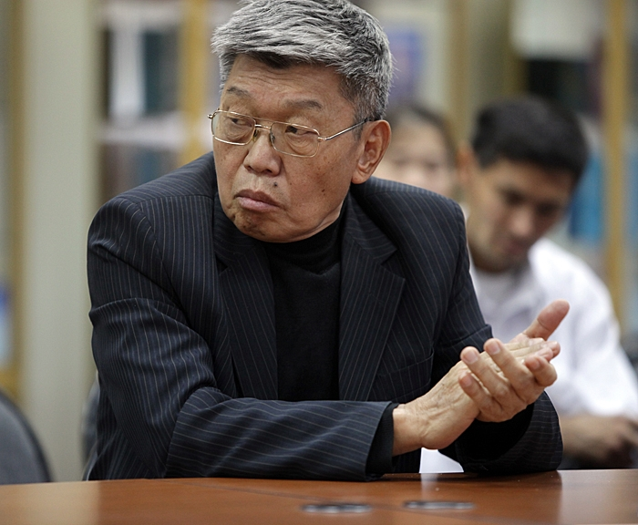 Лаврентий Сон на III Евразийских чтениях